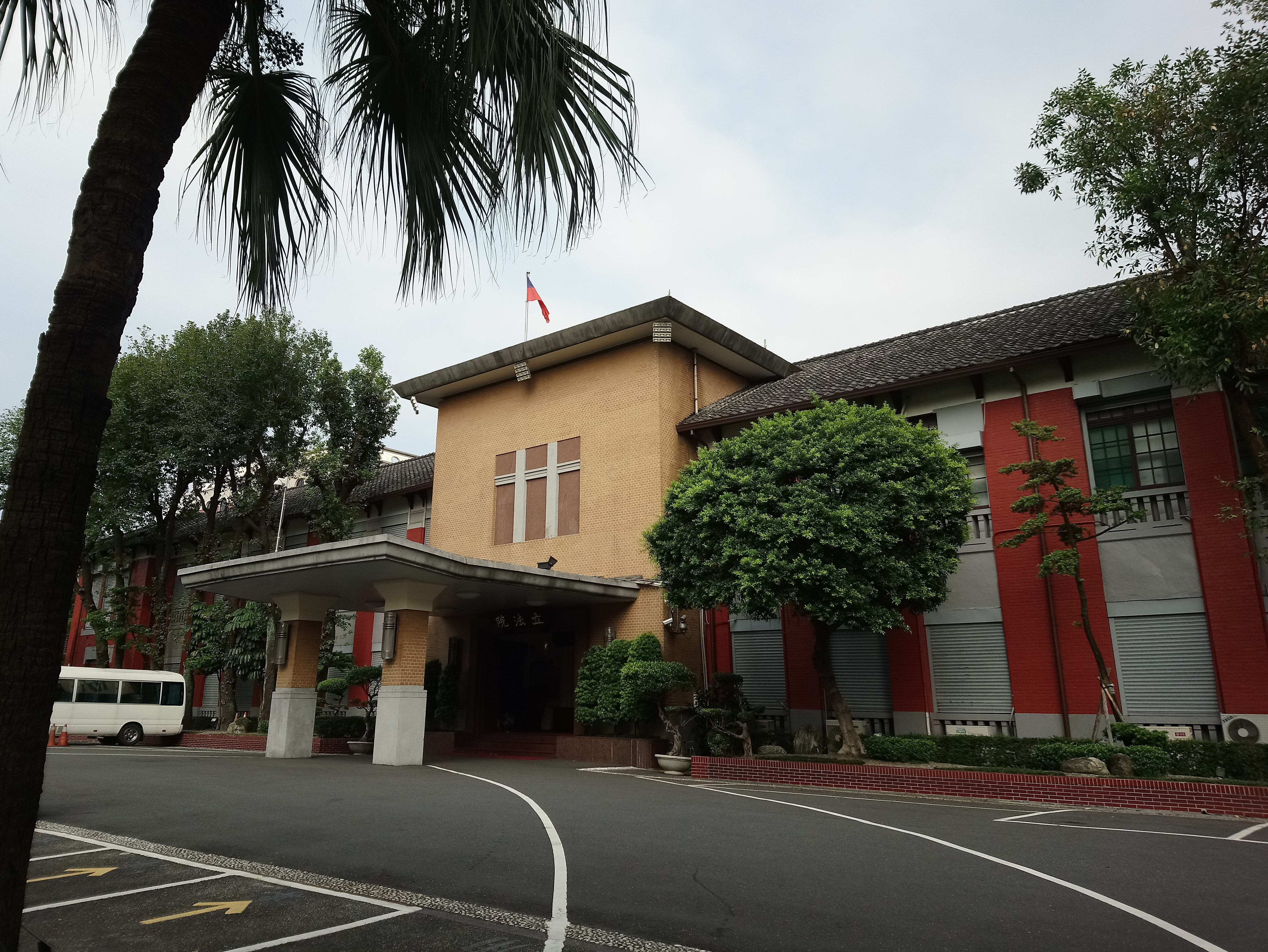 立法院(原臺北州立第二高等女學校),台北市中正區東門次分區幸福里